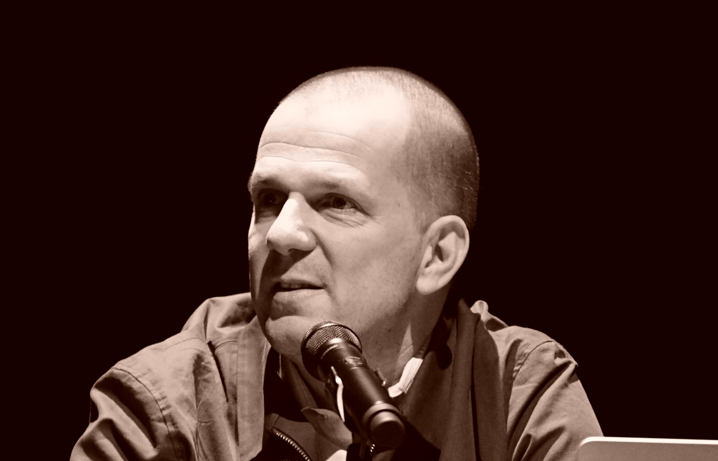 lors de Reims scènes d’Europe de 2019.